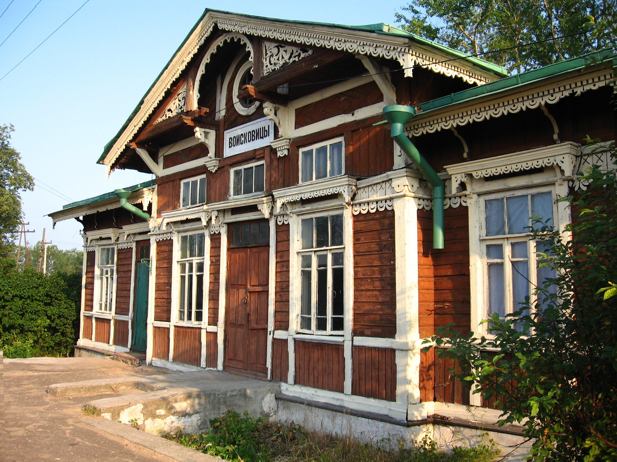 Train stations in Voiskovitsy